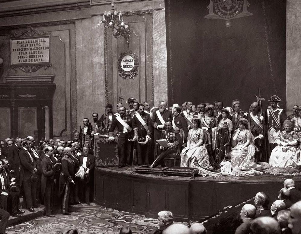 Apertura de las Cortes por parte del Rey Alfonso XIII